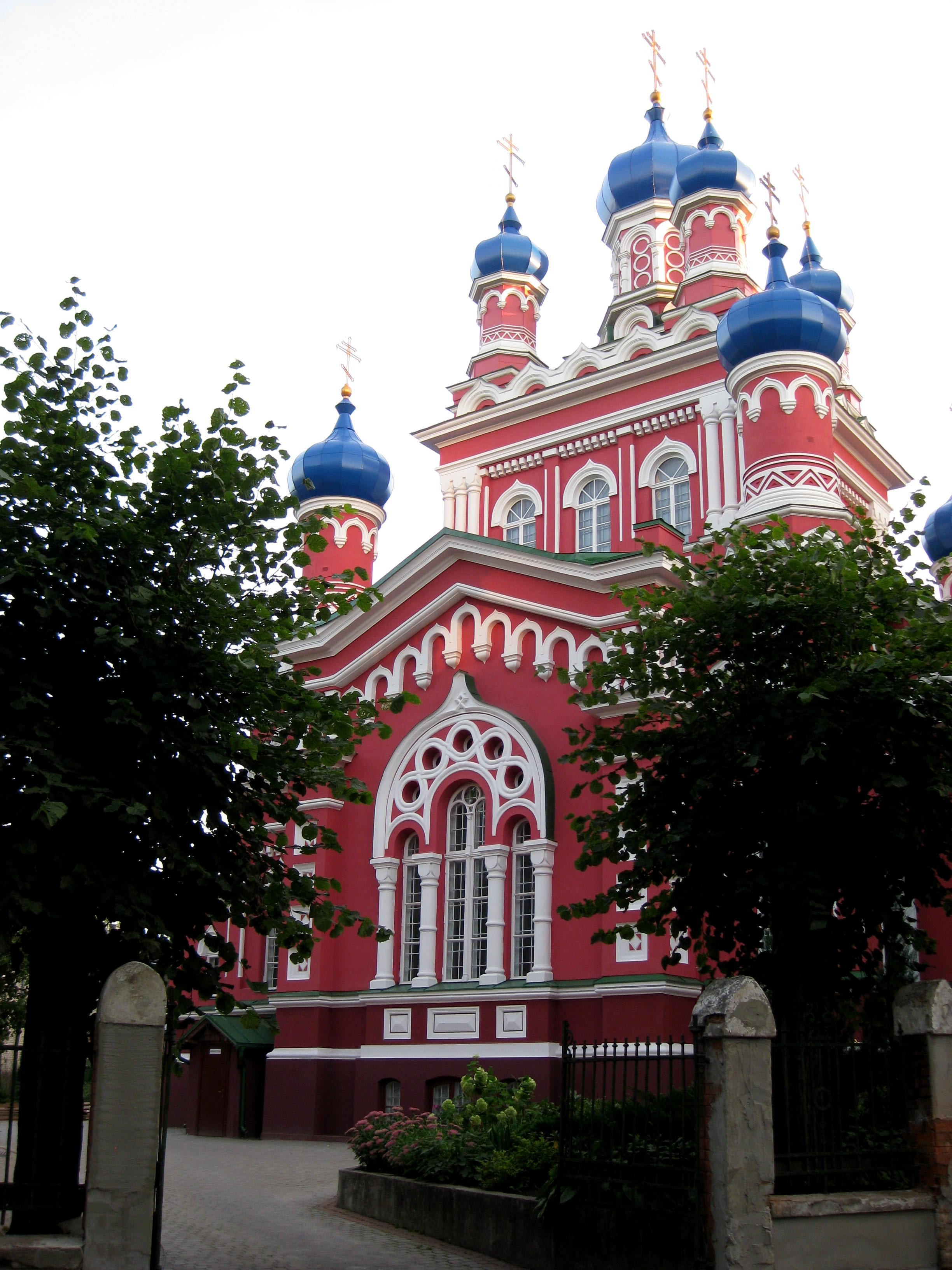 Sv.Trīsvienības pareizticīgo baznīca, Rīga, Meža iela 2